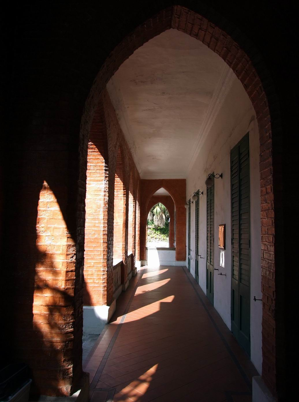 前九龍英童學校前方游廊